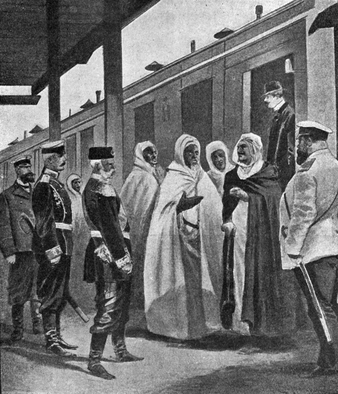 Мароккское посольство в Москве 30 июля 1901 года